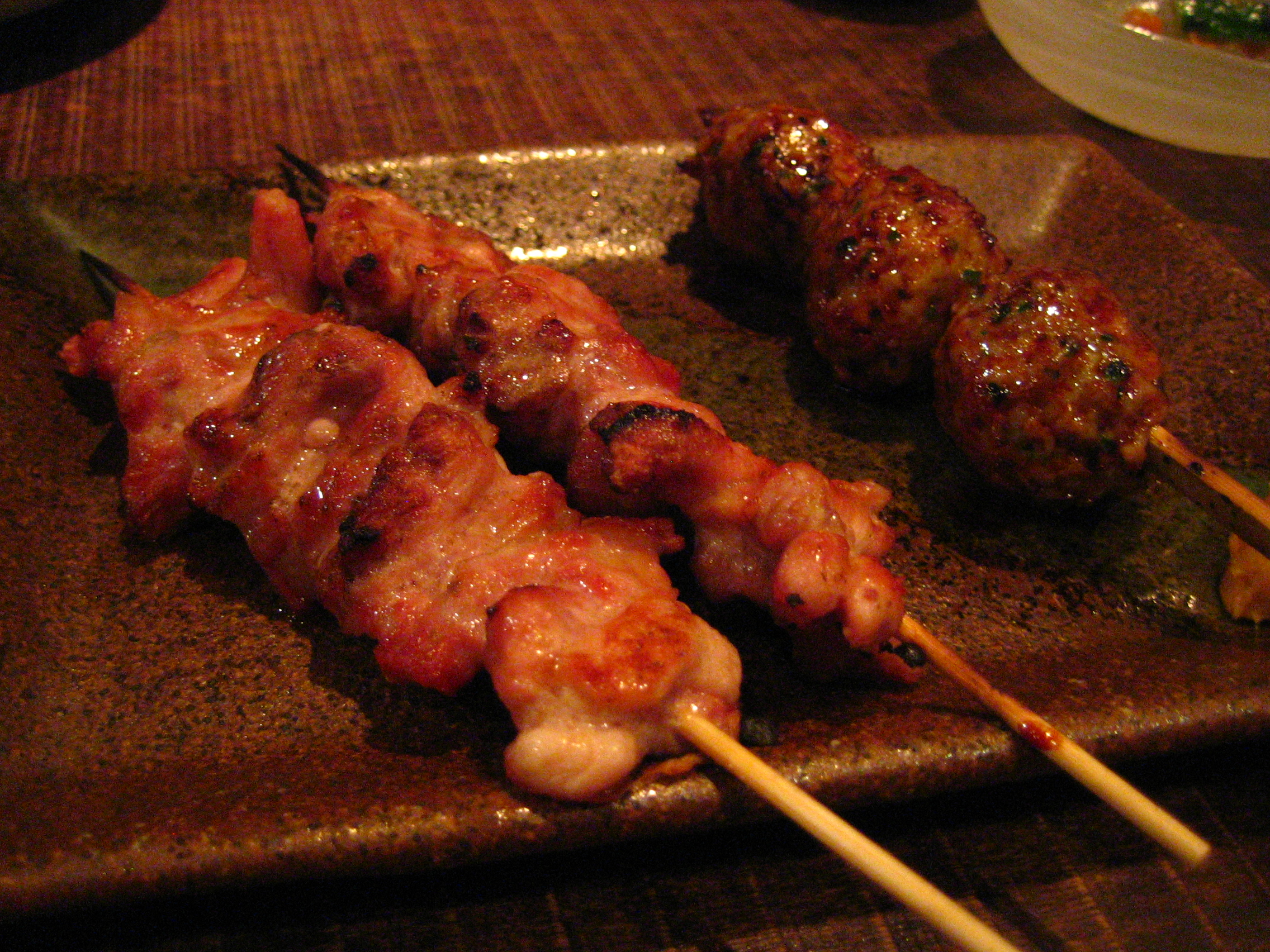 at Nihonbashi Bonbori, a yakitori restaurant in Kakigara-Cho, Tokyo.